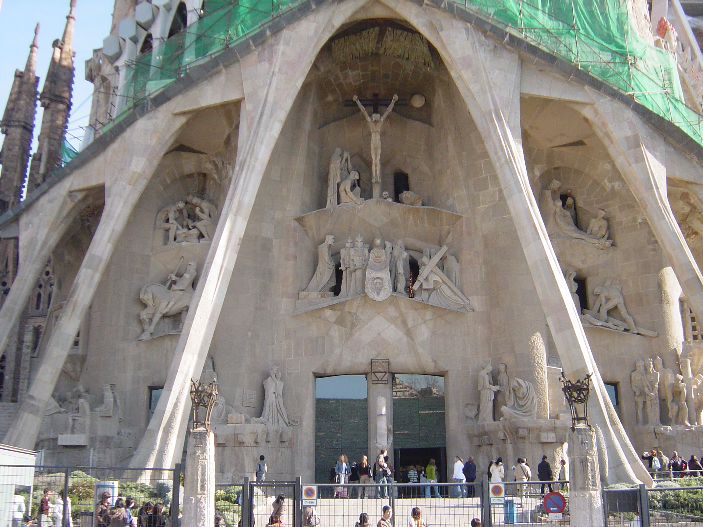 サグラダ･ファミリア教会 受難のファザード、バルセロナ、スペイン